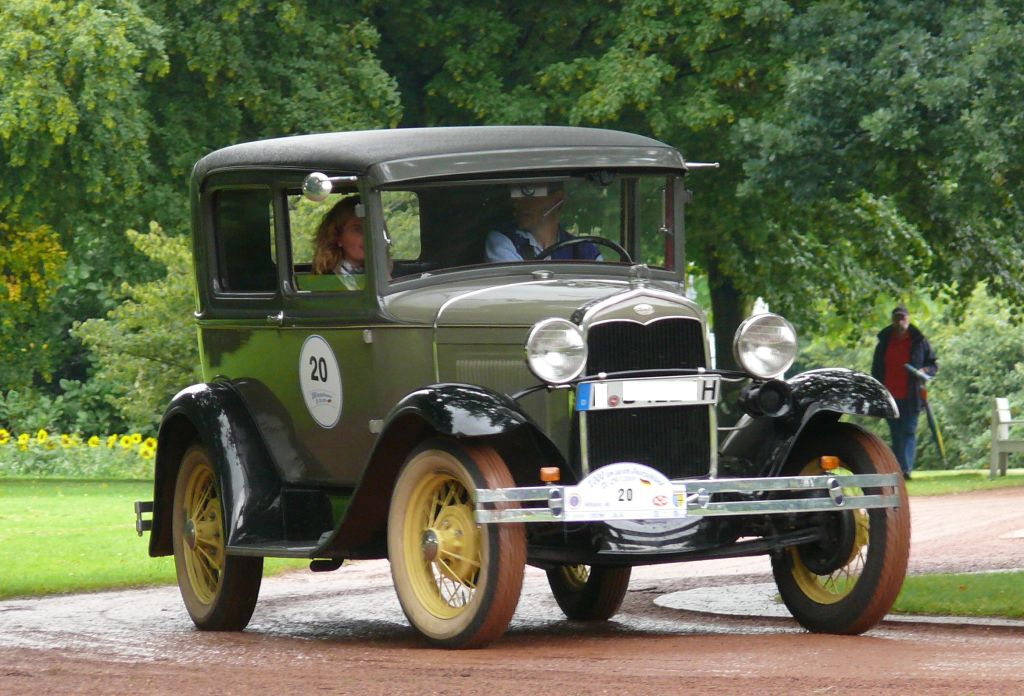 Ford AF Sedan